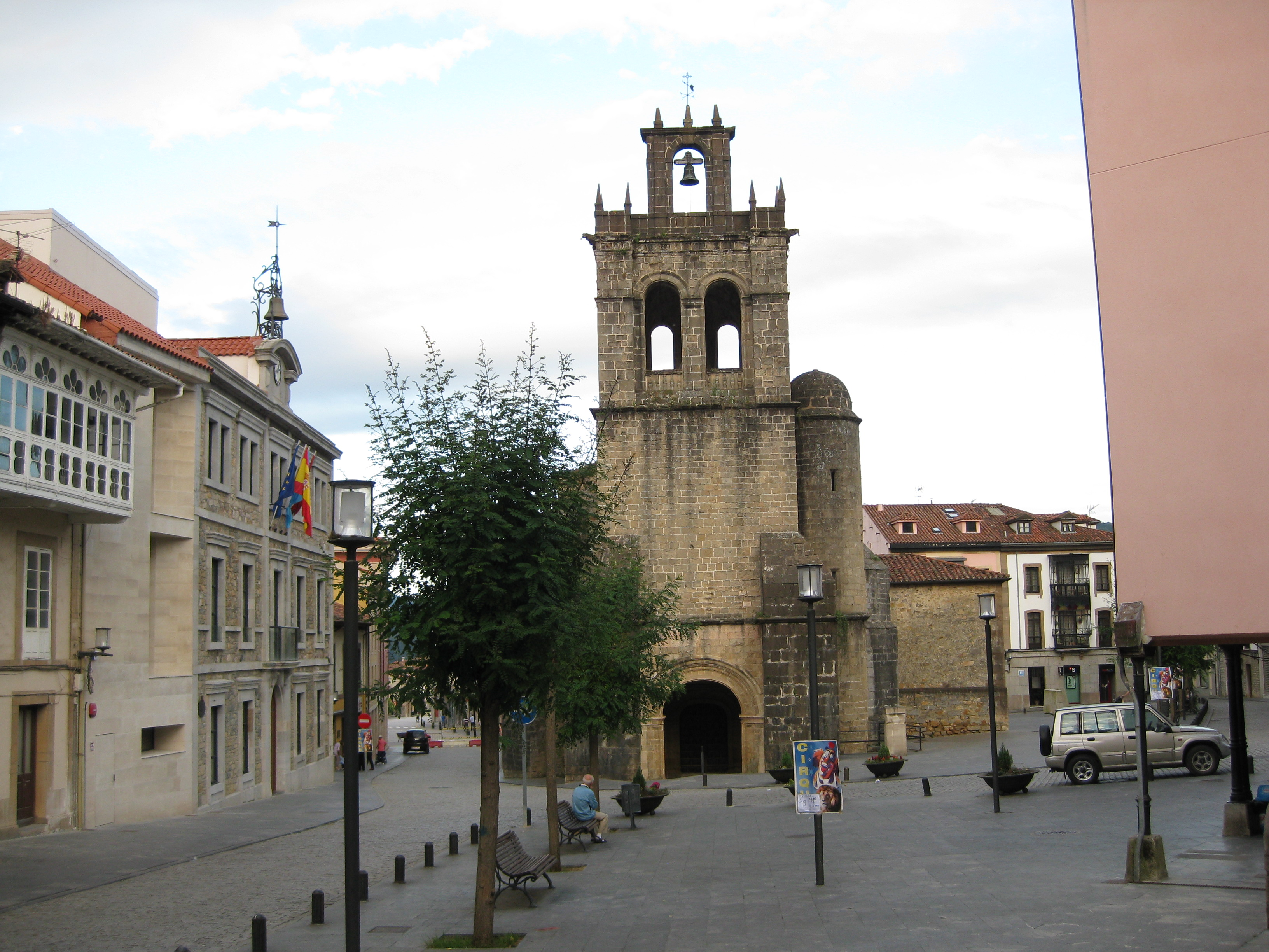 Iglesia de Salas